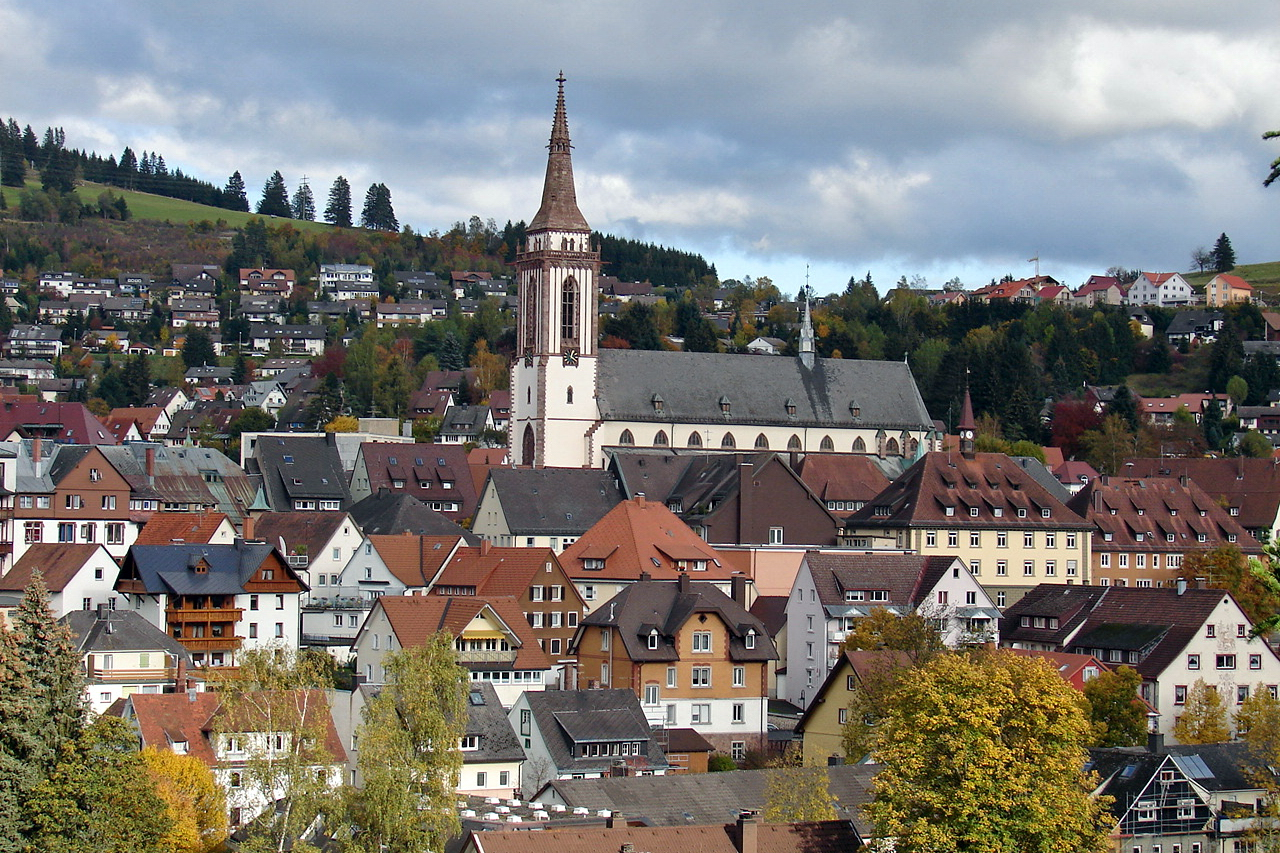 Titisee-Neustadt,ist eine Stadt im Südwesten Baden-Württembergs im Regierungsbezirk Freiburg.